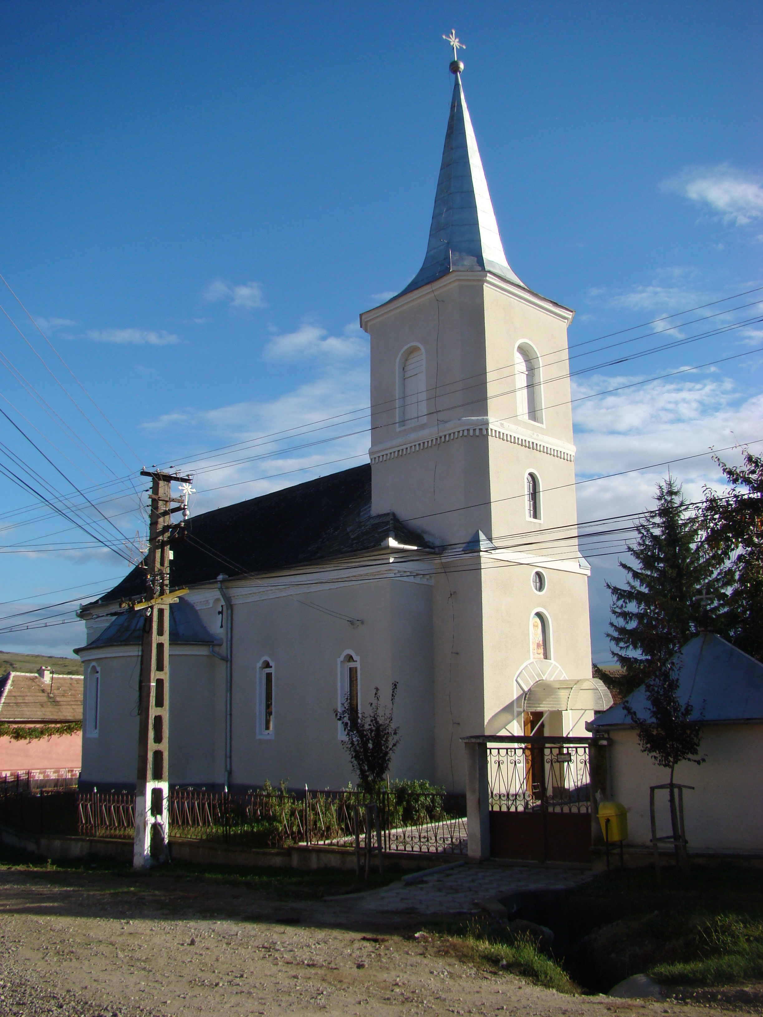 Biserica ortodoxă din Cenade, Alba